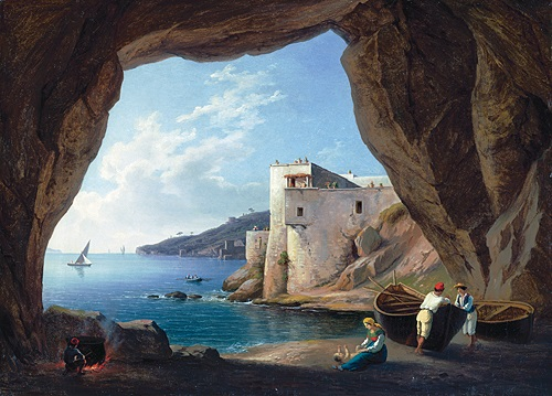 Interessante particolare di gouache tedesca, rappresentante Villa Mazziotti da levante, anziché da ponente come in tutte le altre opere note.